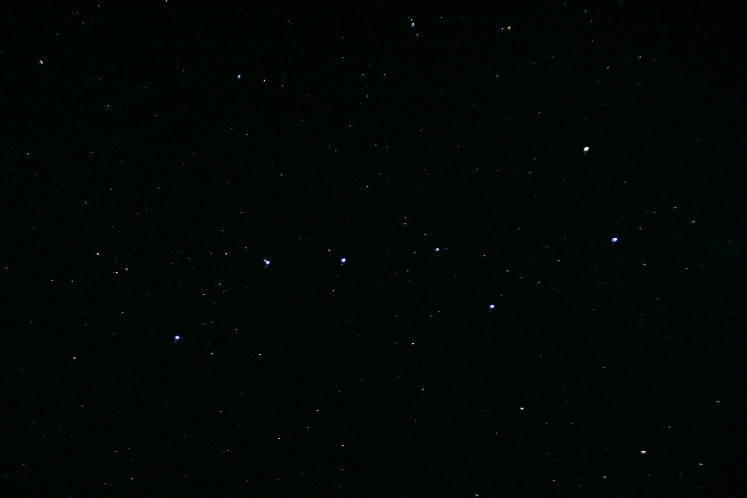 Sternbild Großer Wagen